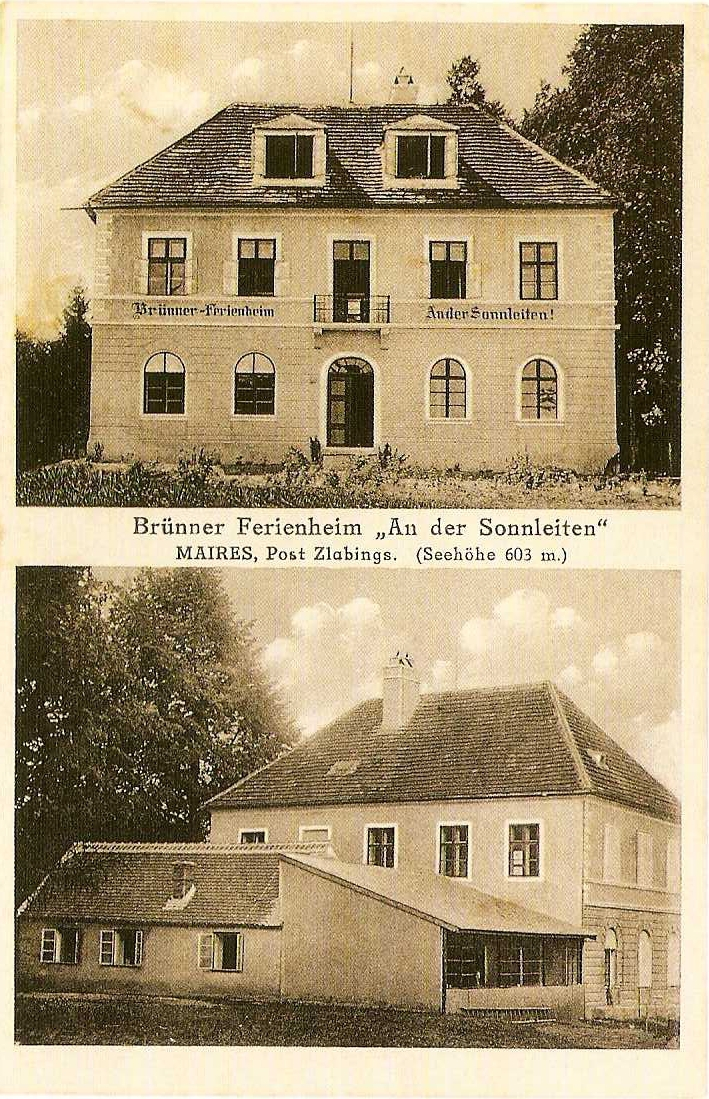 Lovecký zámeček v Maříži, letní sídlo, nyní zbořený